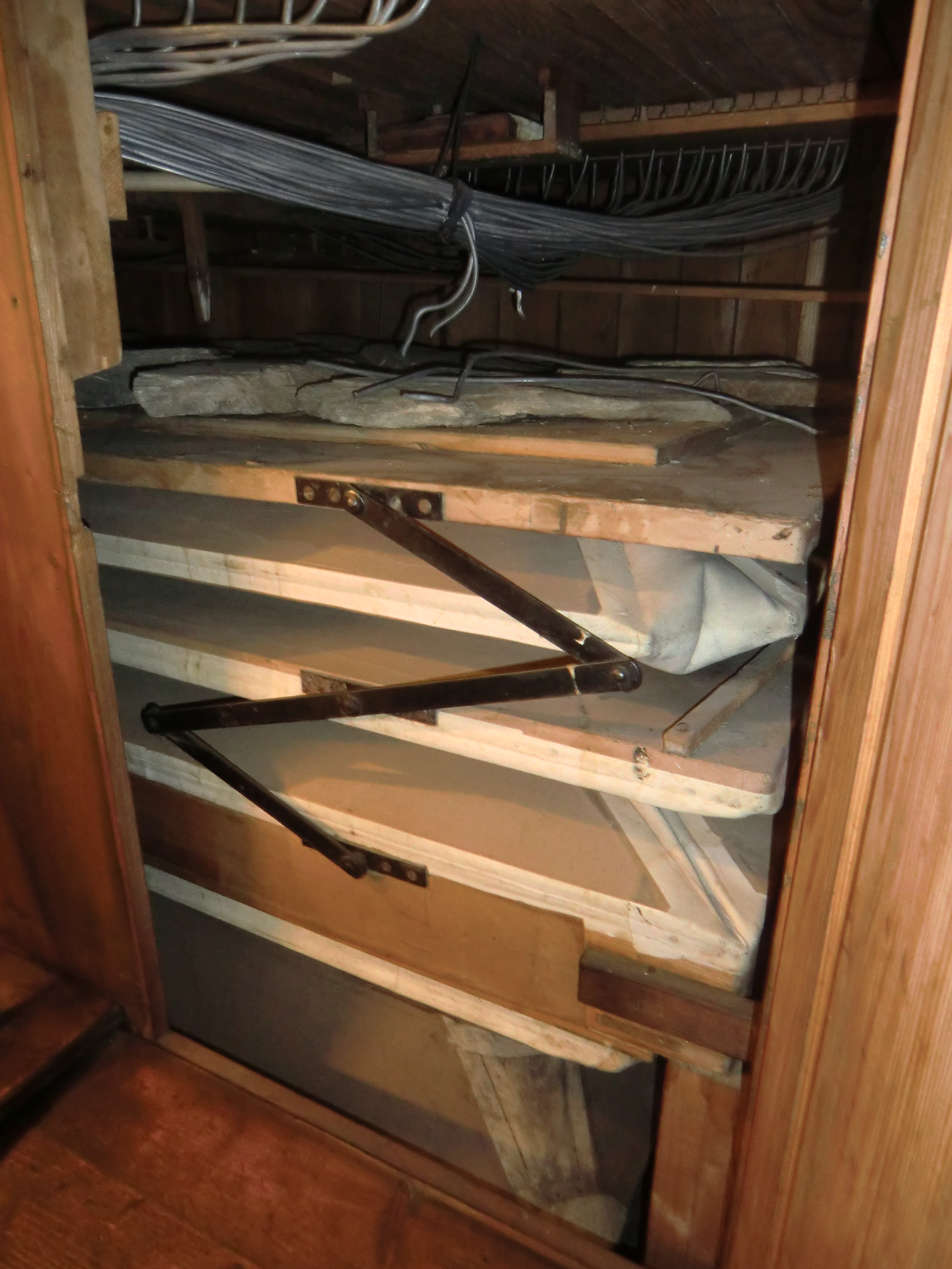 Horn-Orgel in Ransel (1912) - Magazinbalg